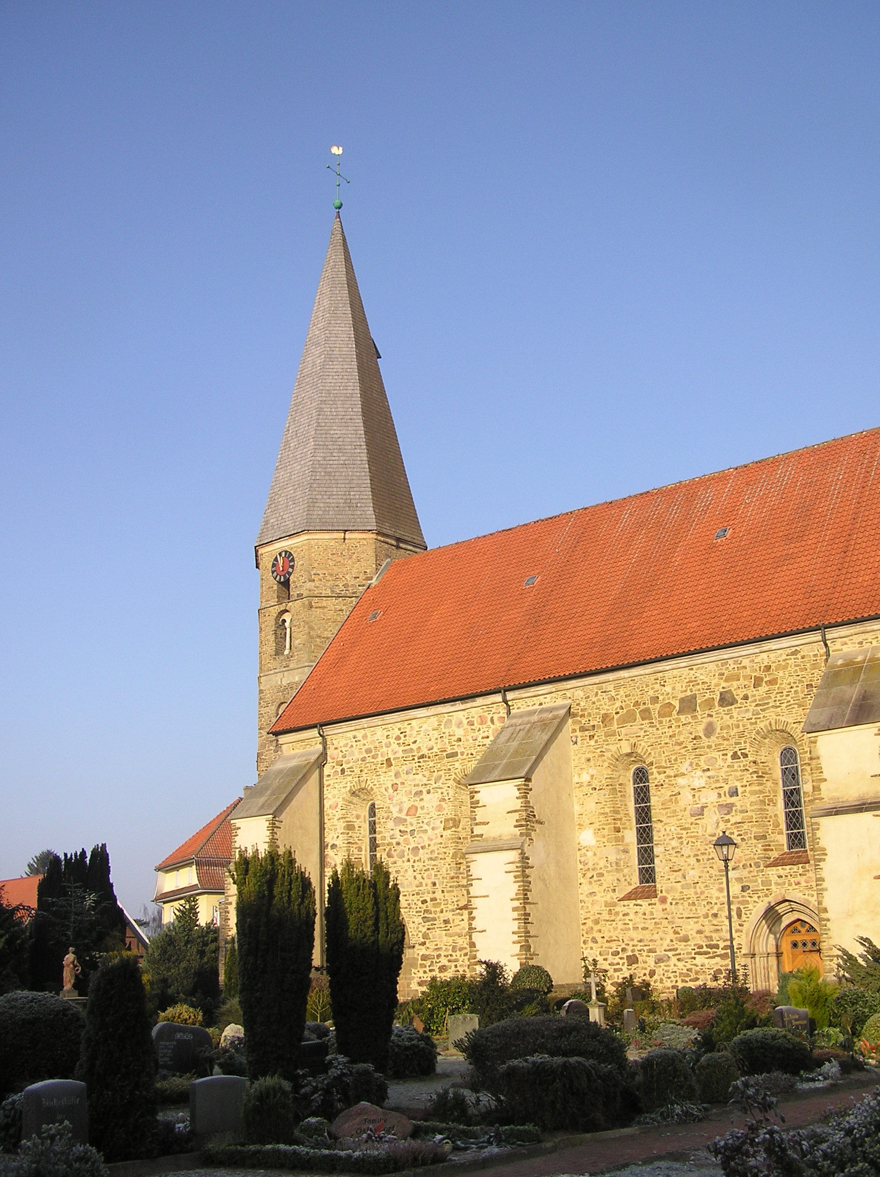 Pfarrkirche St.-Georg in Badbergen